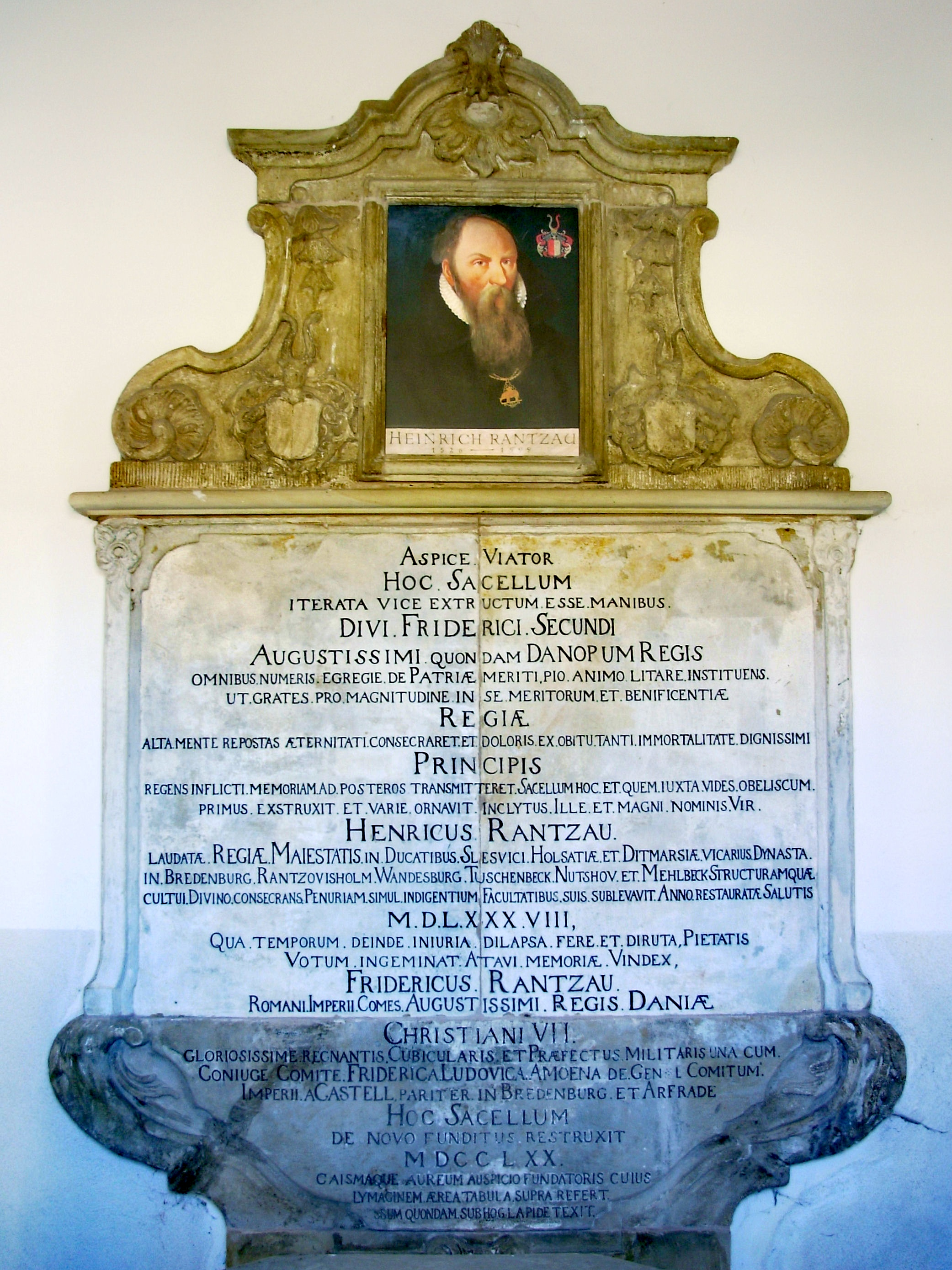 Rantzaukapelle innen